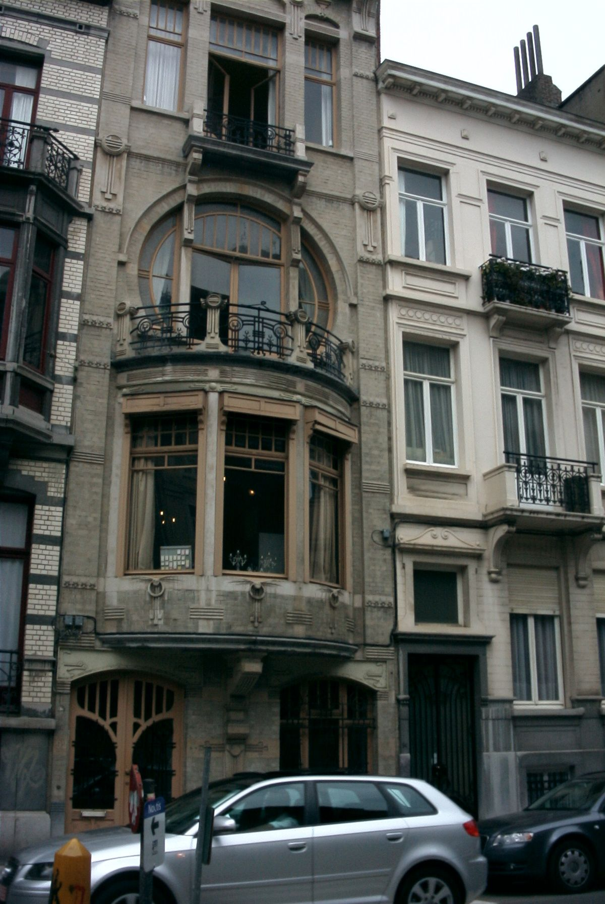 Szecessziós portálok a Horta múzeum szomszédságában, Brüsszel